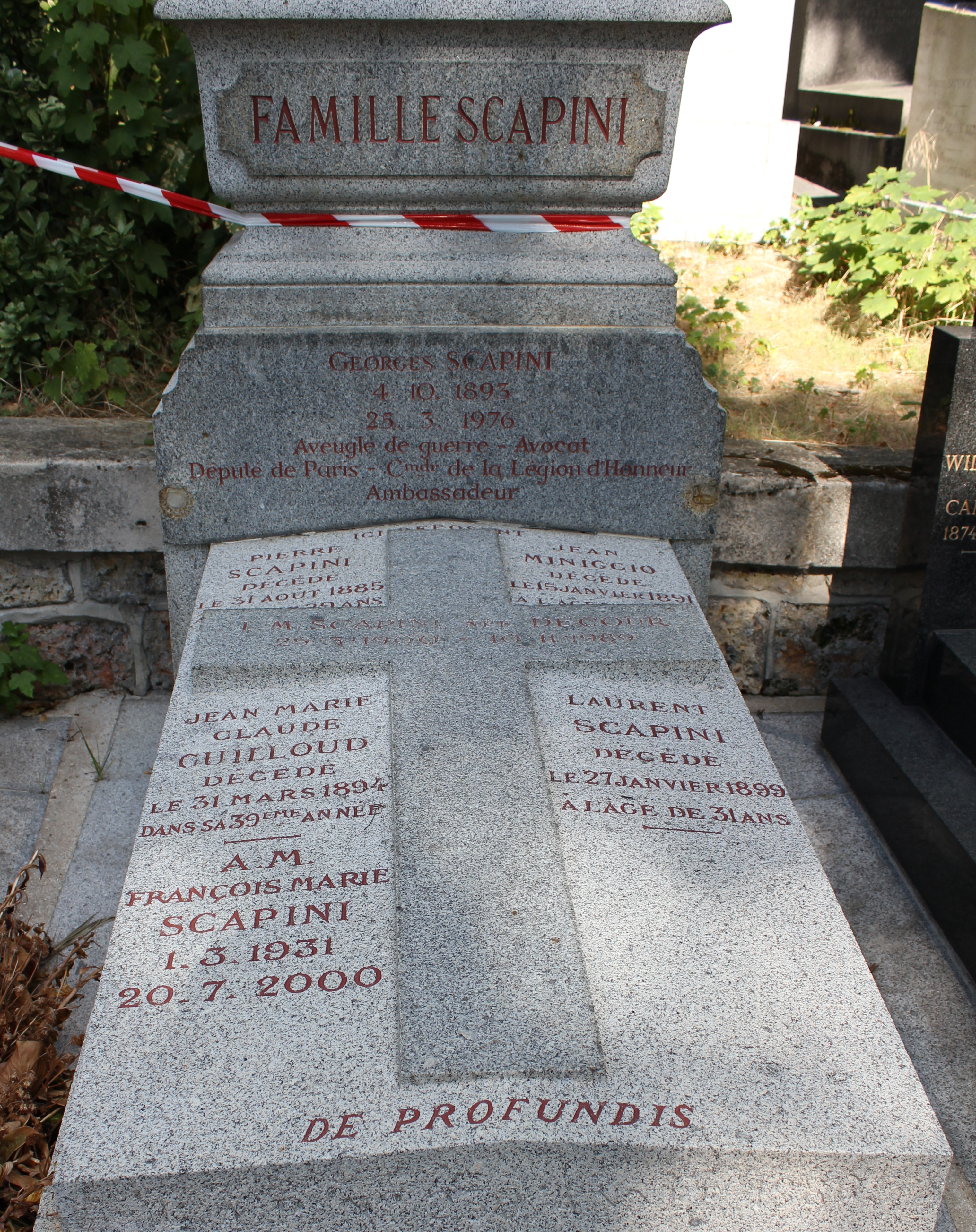 Vue d'ensemble